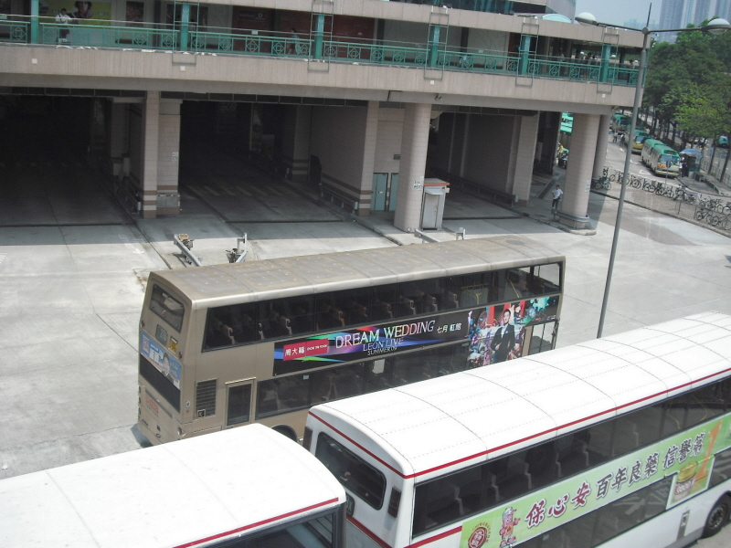 中文（香港）: 上水巴士總站（近入口處）。